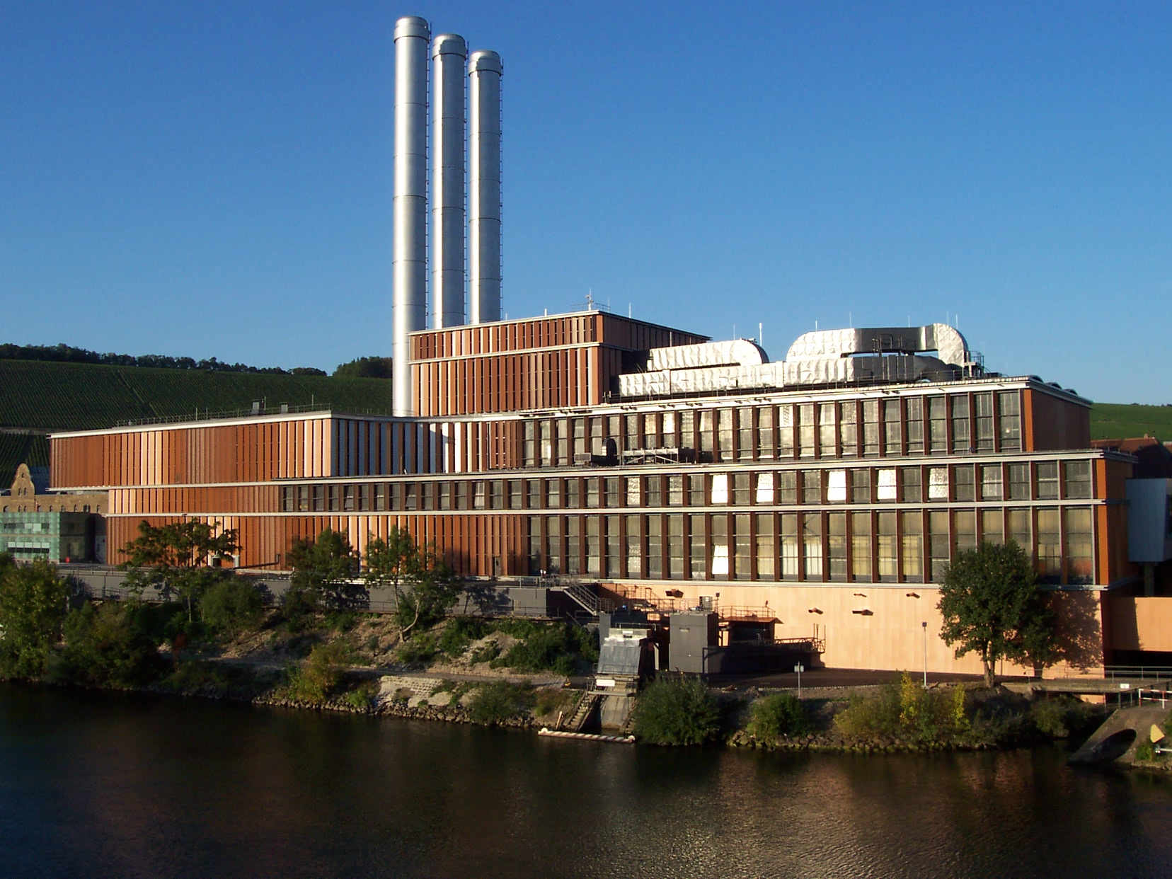 Heizkraftwerk Würzburg, Powerplant Wuerzburg